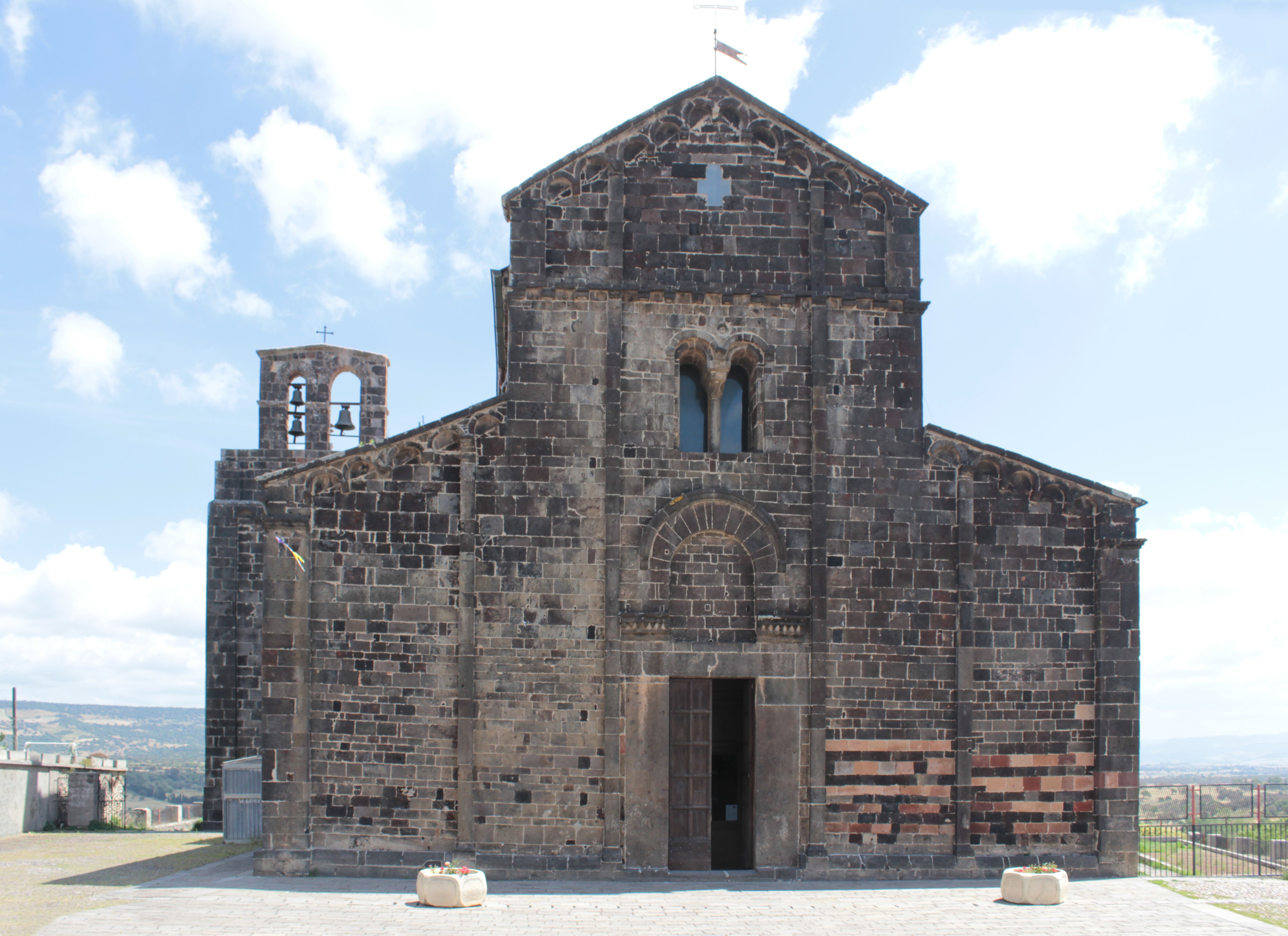 Eglise Santa Maria del Regno a Ardara en Sardaigne